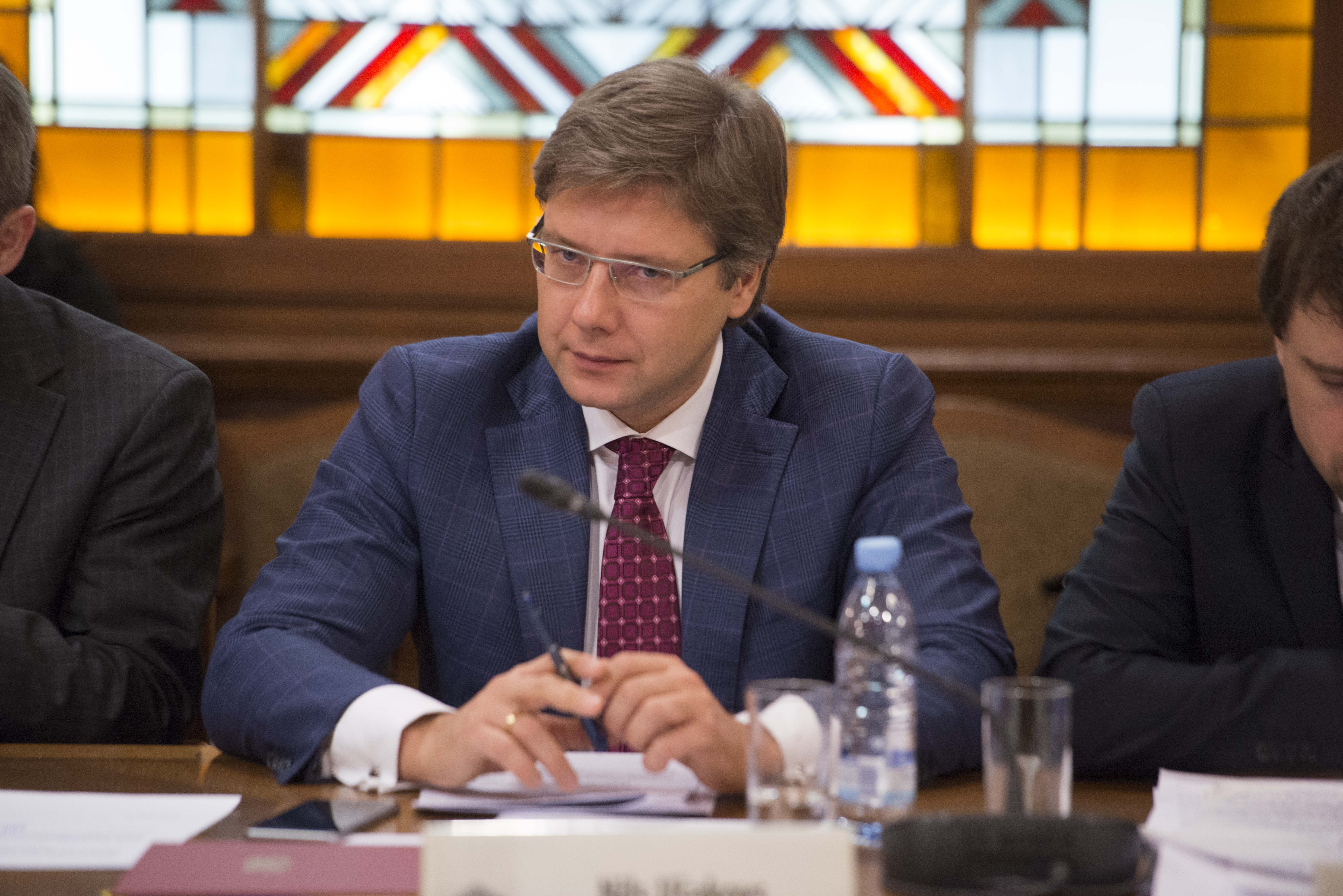 2015.gada 26.janvāris. Parlamentārās izmeklēšanas komisijas par Latvijas valsts rīcību, izvērtējot 2013.gada 21.novembrī Zolitūdē notikušās traģēdijas cēloņus, un turpmākajām darbībām, kas veiktas normatīvo aktu un valsts pārvaldes un pašvaldību darbības sakārtošanā, lai nepieļautu līdzīgu traģēdiju atkārtošanos, kā arī par darbībām minētās traģēdijas seku novēršanā sēde. Foto: Reinis Inkēns, Saeimas Kanceleja Izmantošanas noteikumi: saeima.lv/lv/autortiesibas